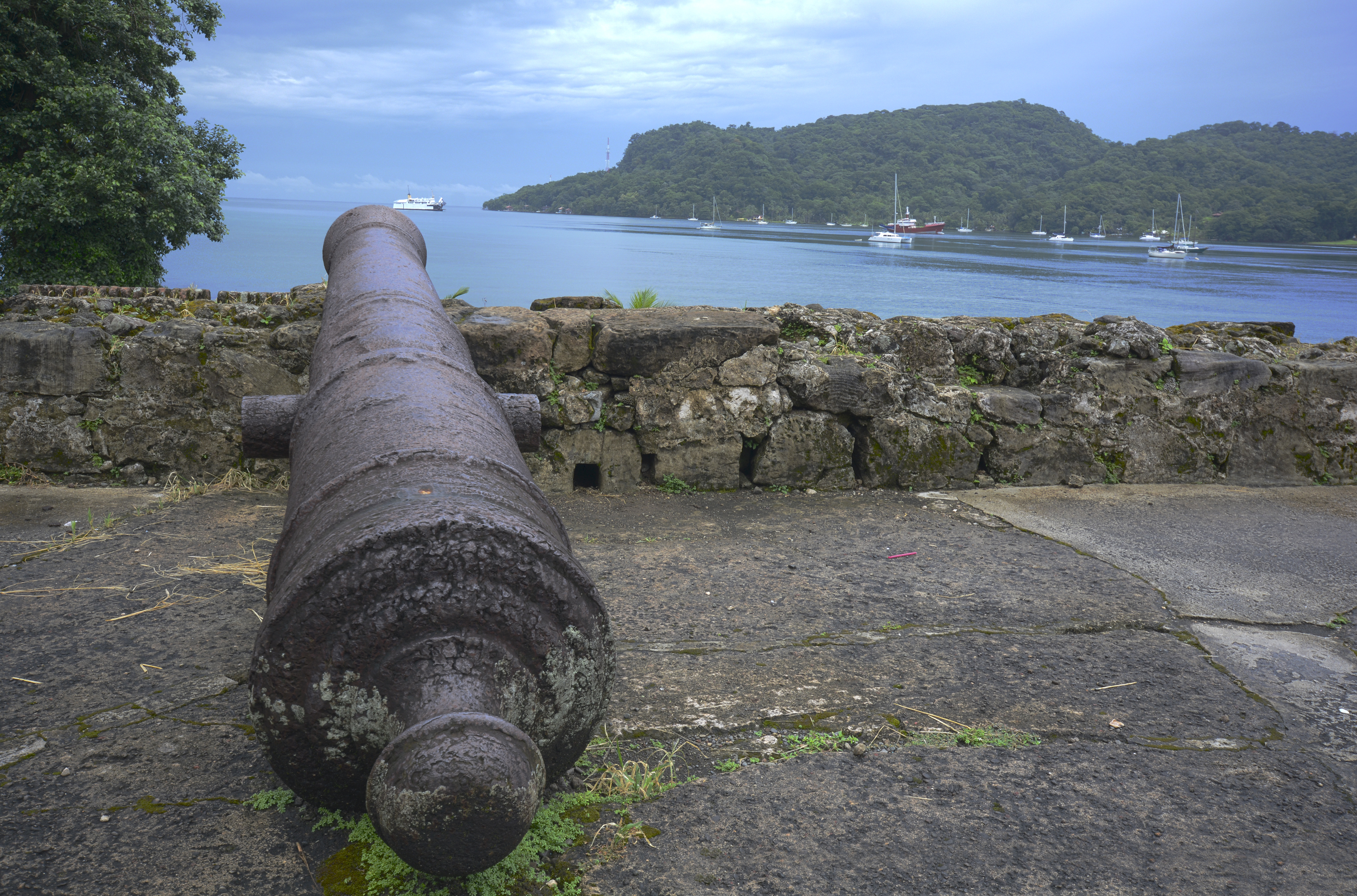 Fortaleza de Santiago